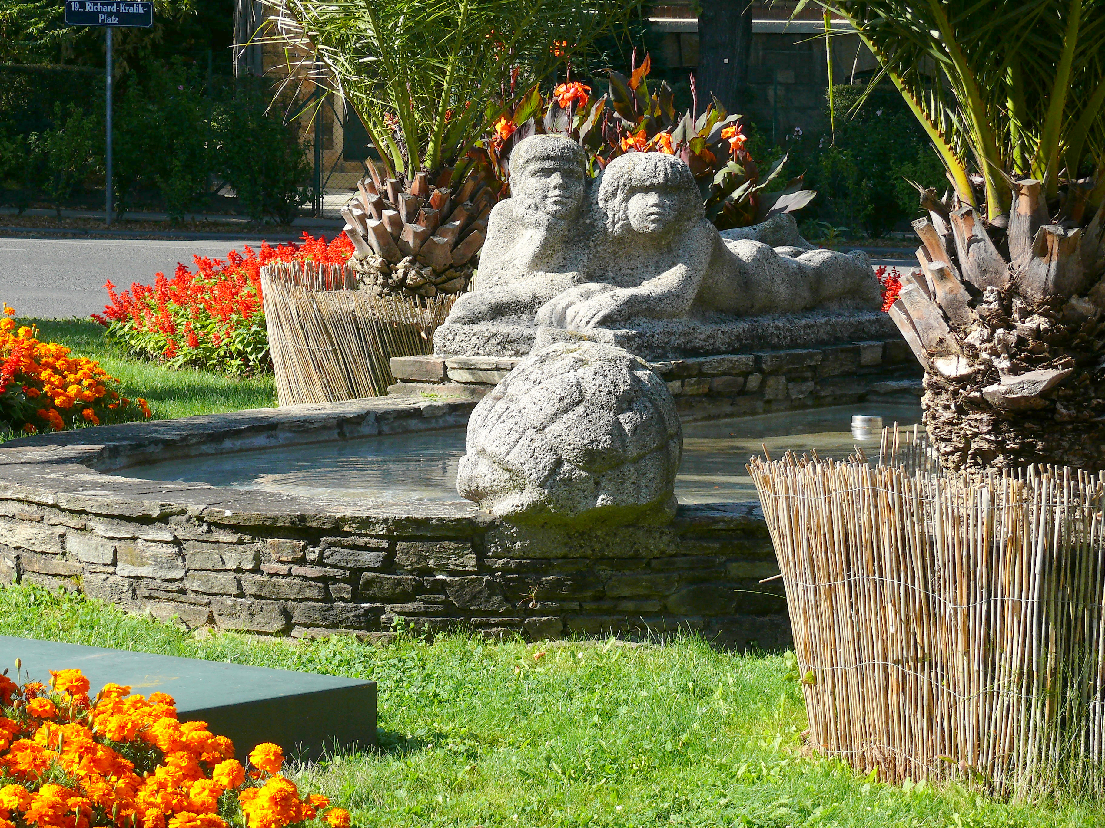 Cottageviertel: Brunnen